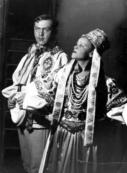 Indig Ottó: A torockói menyasszony. Belvárosi Színház. Gyergyai István (Bárány András), Dajka Margit (Patkós Nagy Rózsi). Fotó: Jób E.